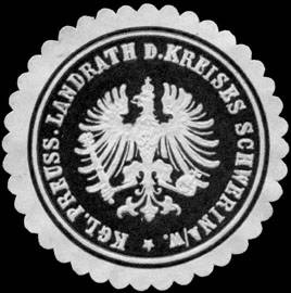 Sealing stamp Title: K. Pr. Landrath des Kreises - Schwerin/Warthe Description: schwarz, weiß, geprägt Place: Schwerin/Warthe size: 4 cm